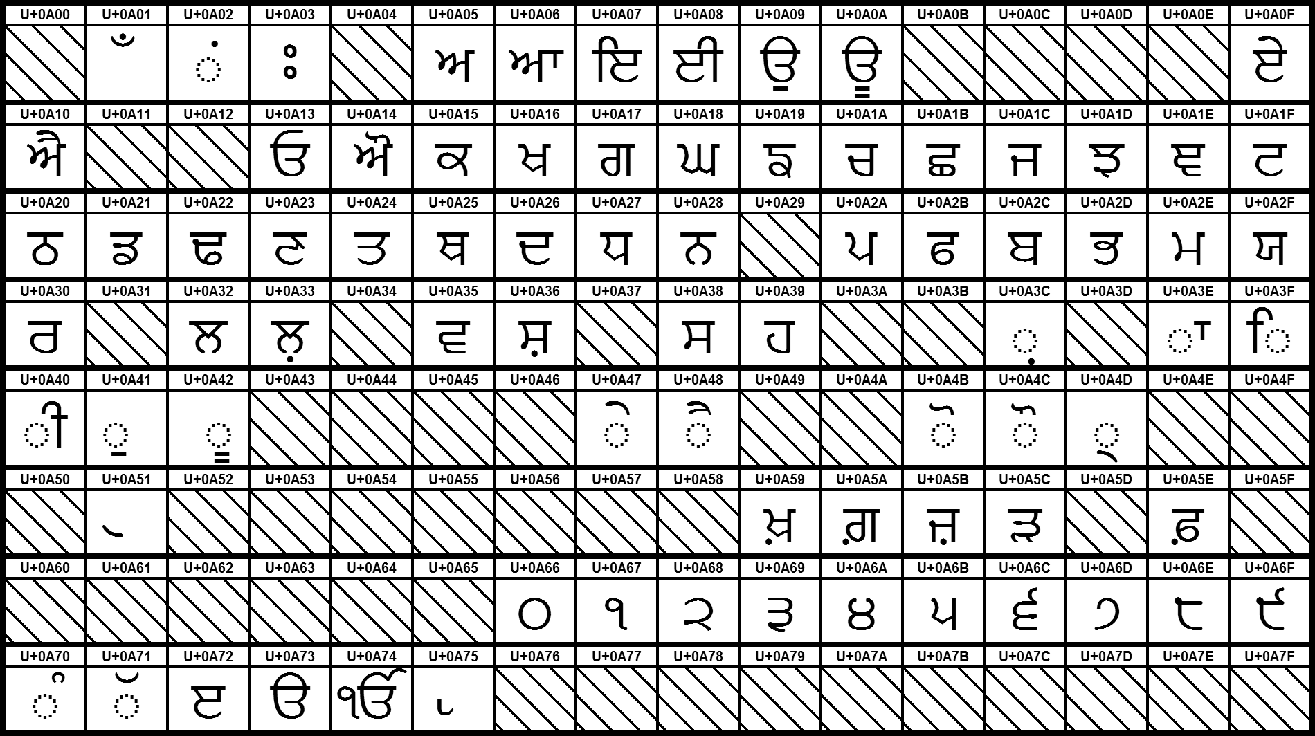 Grafiktafel für den Unicodeblock Gurmukhi. Schraffierte Felder sind unbesetzte Codepoints.